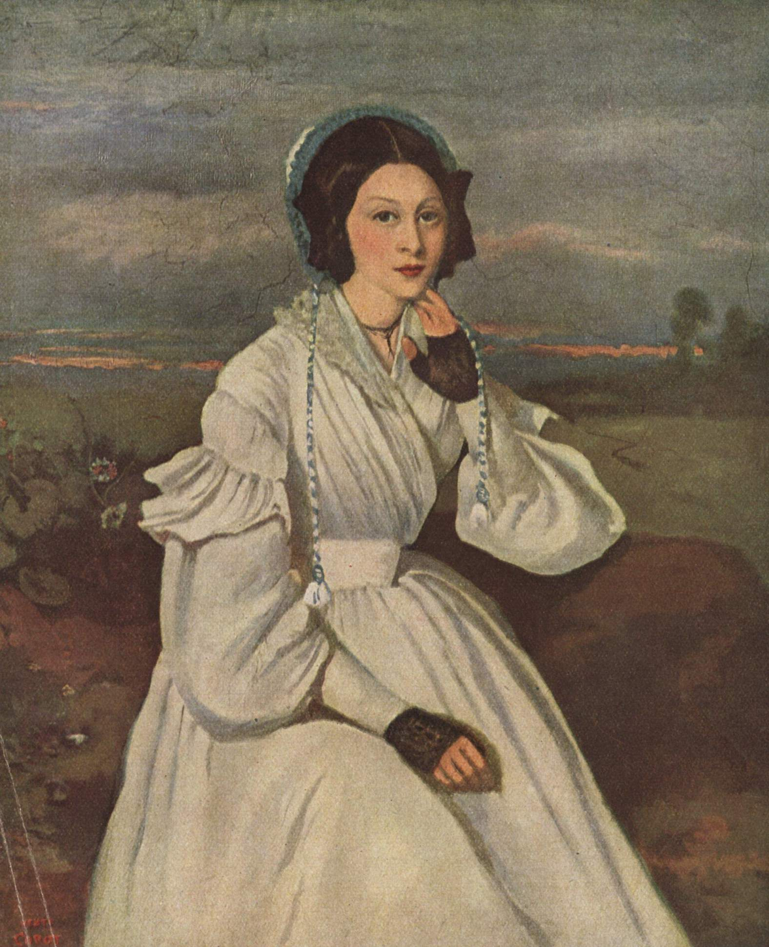 Porträt Madame Charmois